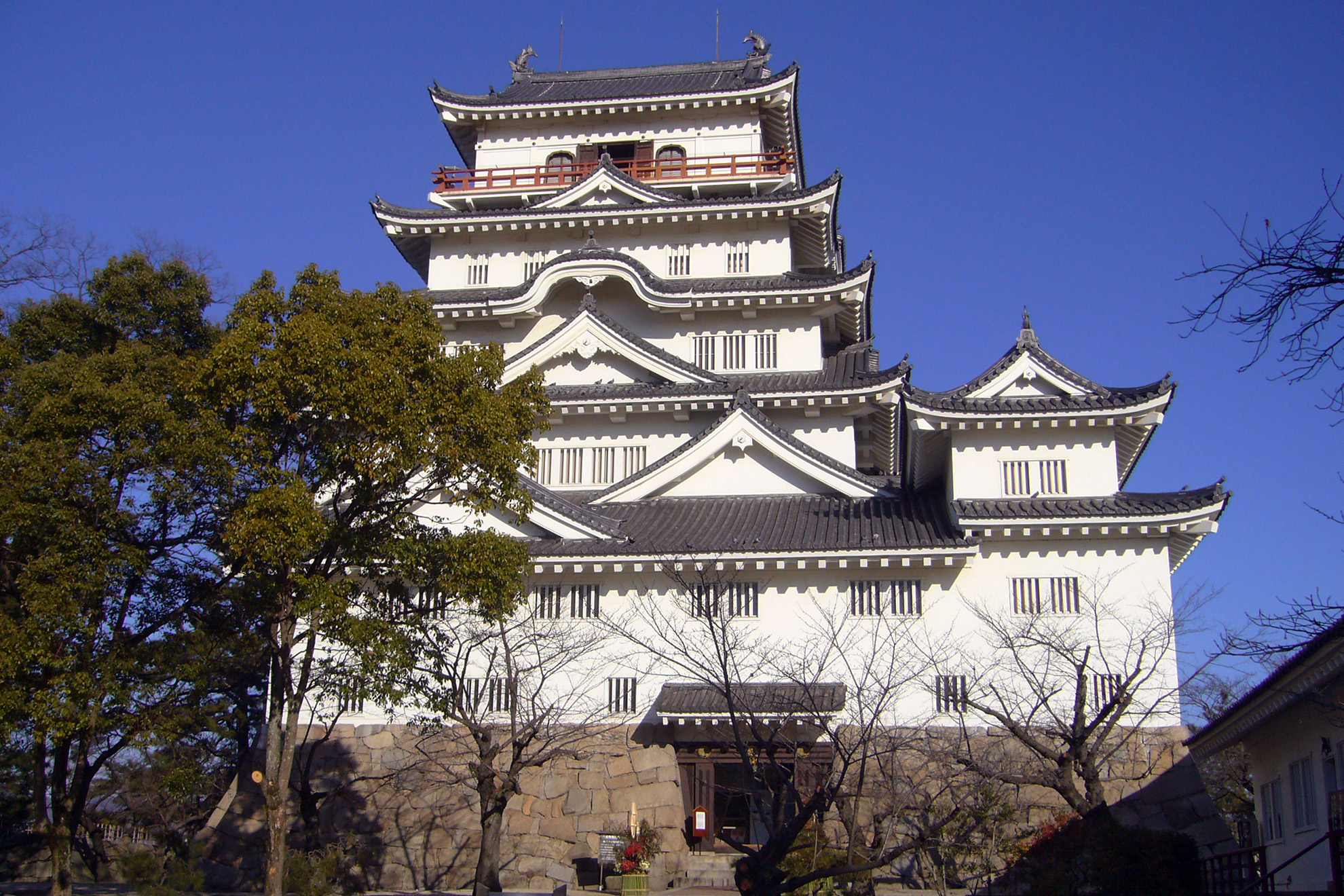 Fukuyama Castle "Tenshu" in Fukuyama, Hiroshima prefecture, Japan